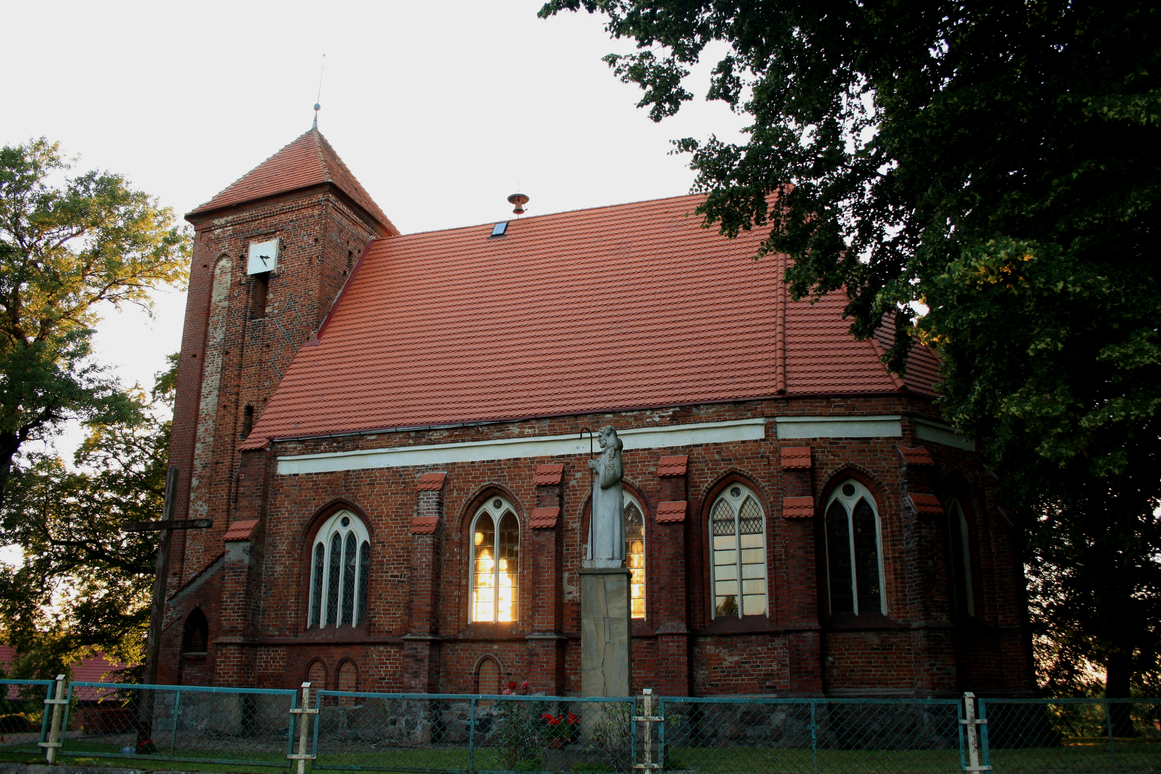 Kościół w Barzowicach